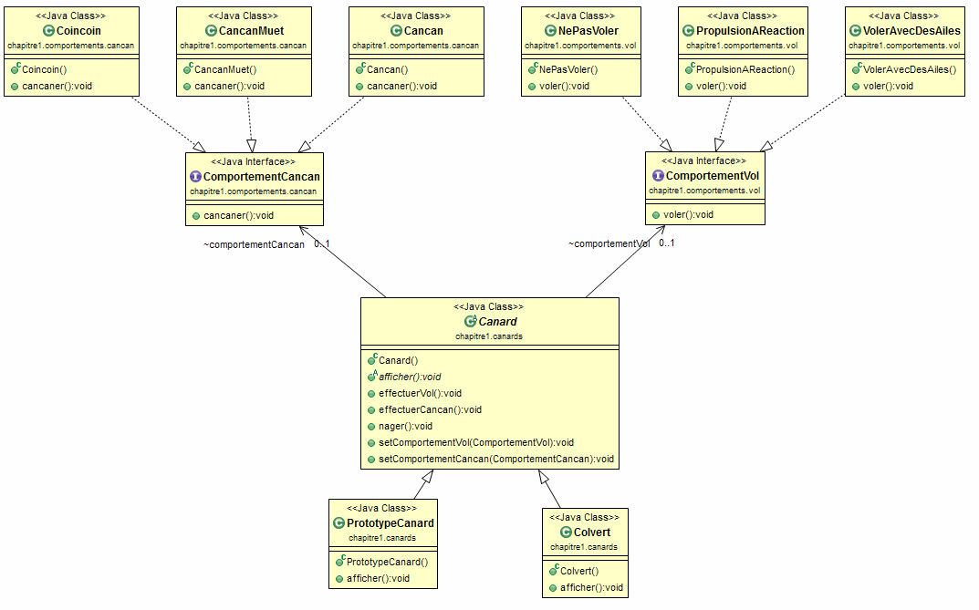 Diagramme UML pour illustrer le patron de conception stratégie en JAVA